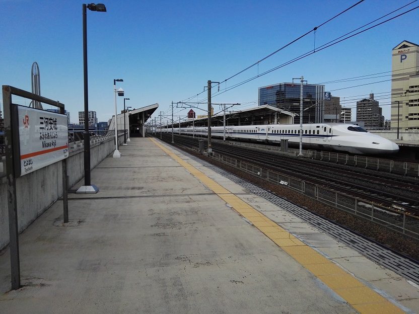 A Kodama is stopping at Mikawa-Anjo Station